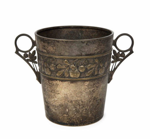 Württembergische Metallwarenfabrik Mark